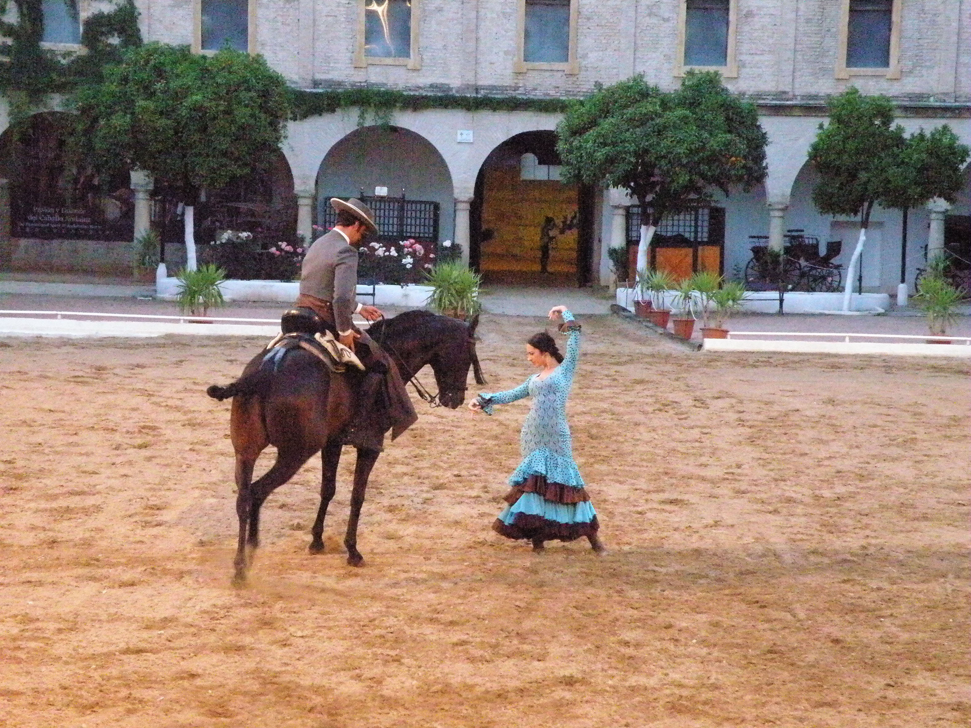 Caballerizas Reales, Córdoba (España).